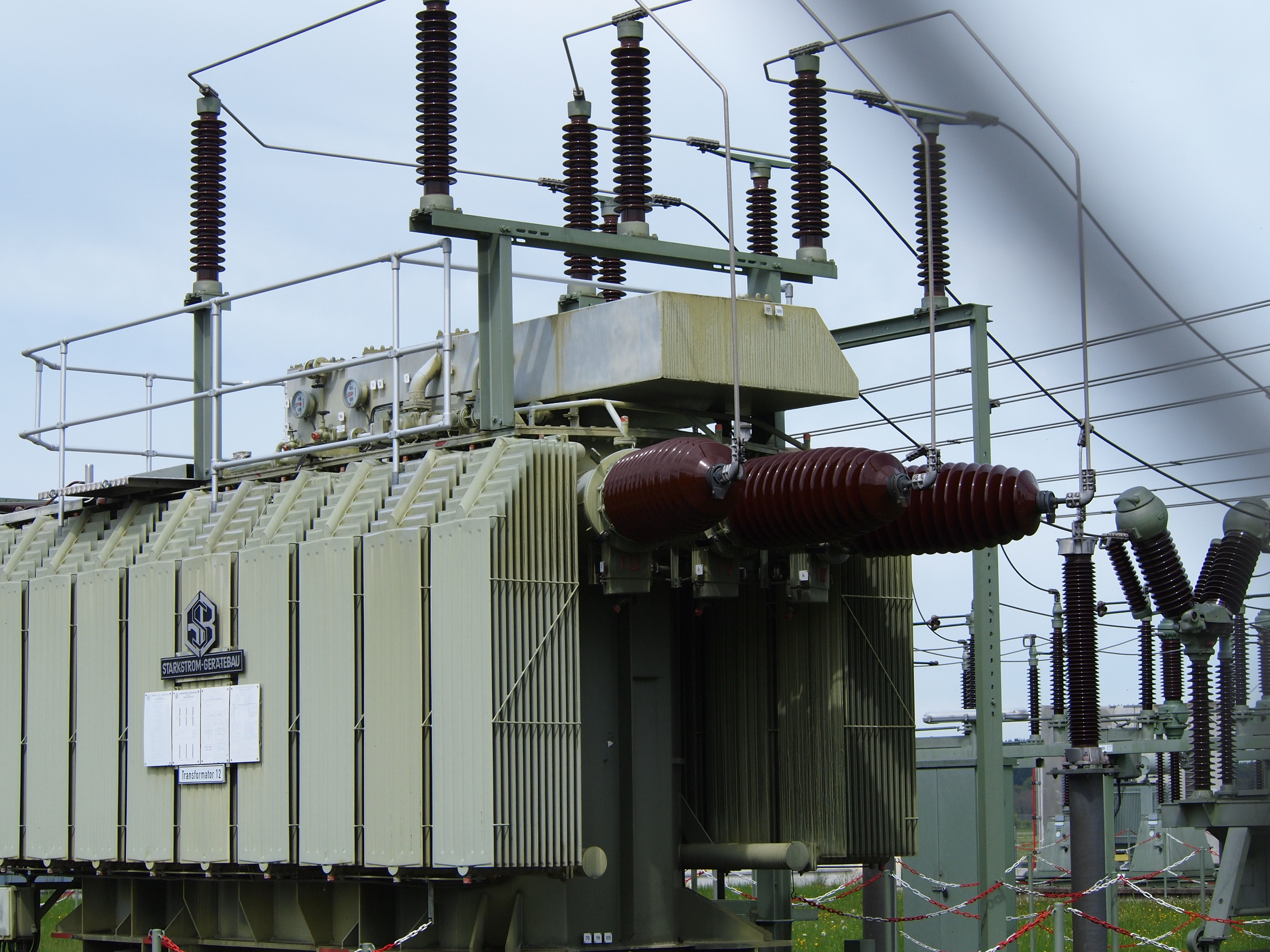 Transformator 12 im Umspannwerk Nr. 730 in Leinau, Gemeinde Pforzen. Das Umspannwerk ist eines von zwei Umspannwerken, welche die Stadt Kaufbeuren mit Strom versorgen. Trafo Nr. 12: Starkstrom Gerätebau, 40 MVA, 110kV/10KV, Baujahr 1984